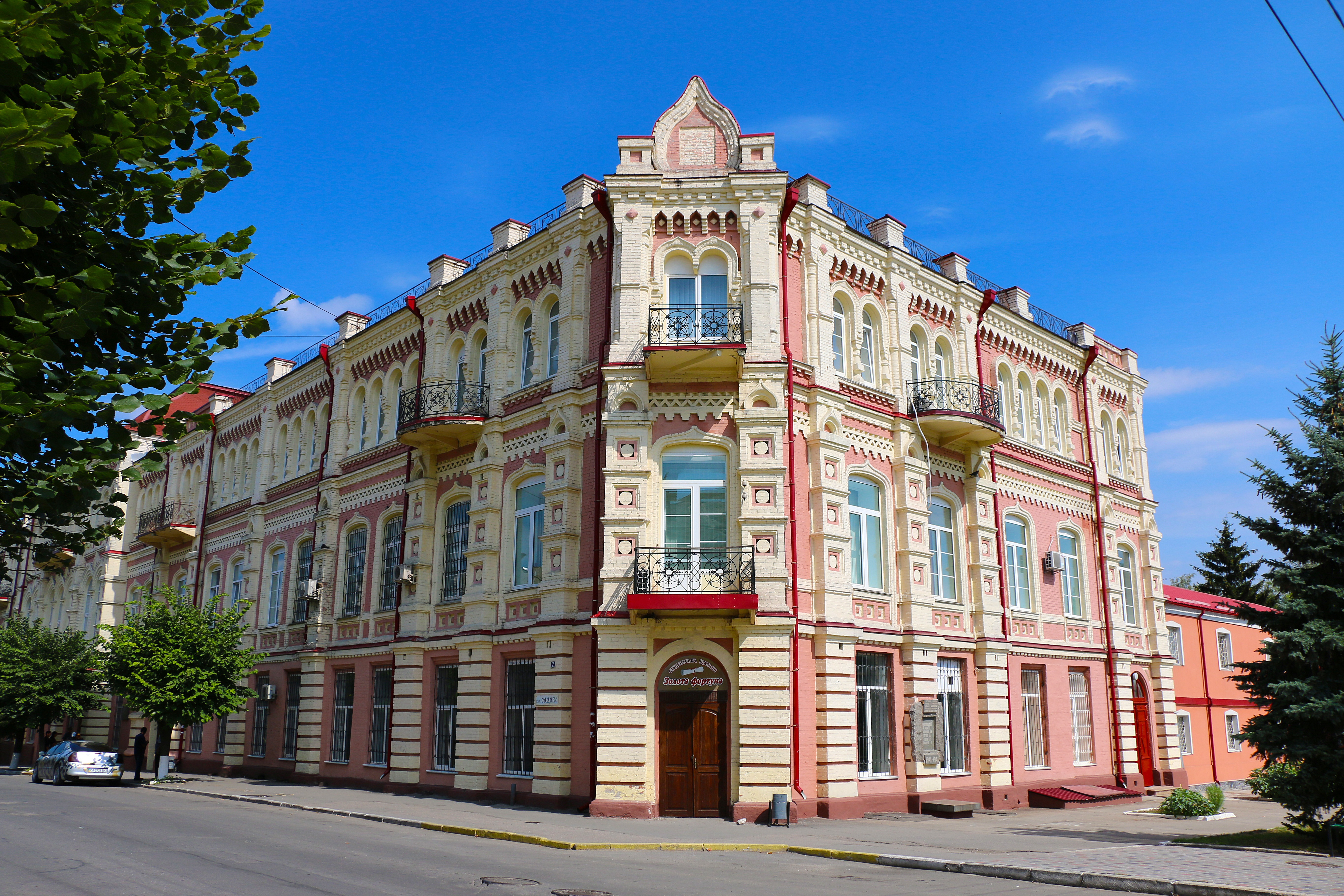 Міська управа (мур.), Умань, Садова вул., 2